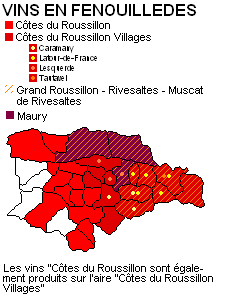 Carte des vins en Fenouillèdes (66, France)